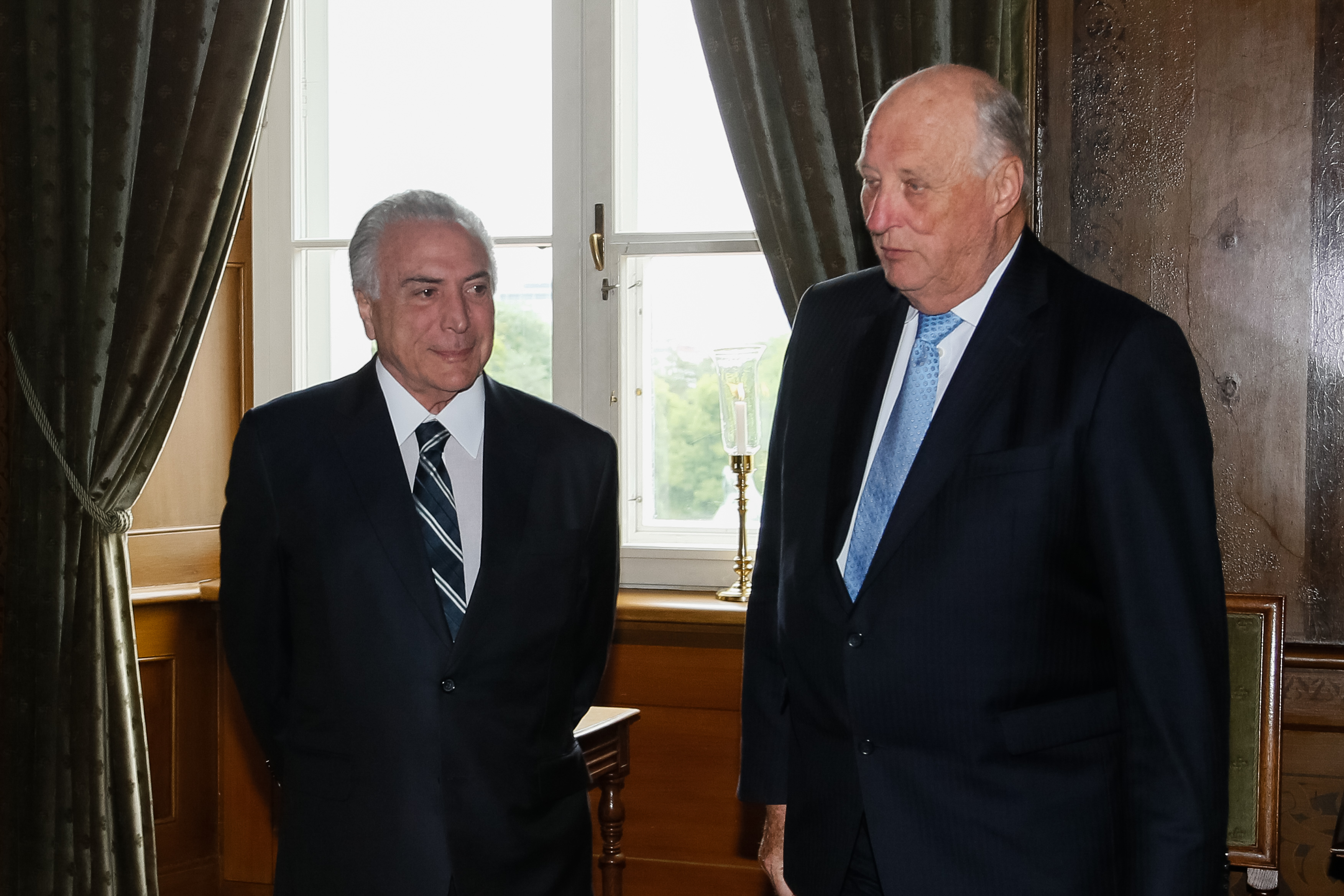 (Oslo - Noruega, 23/06/2017) Encontro com o Rei Harald V da Noruega. Foto: Beto Barata/PR